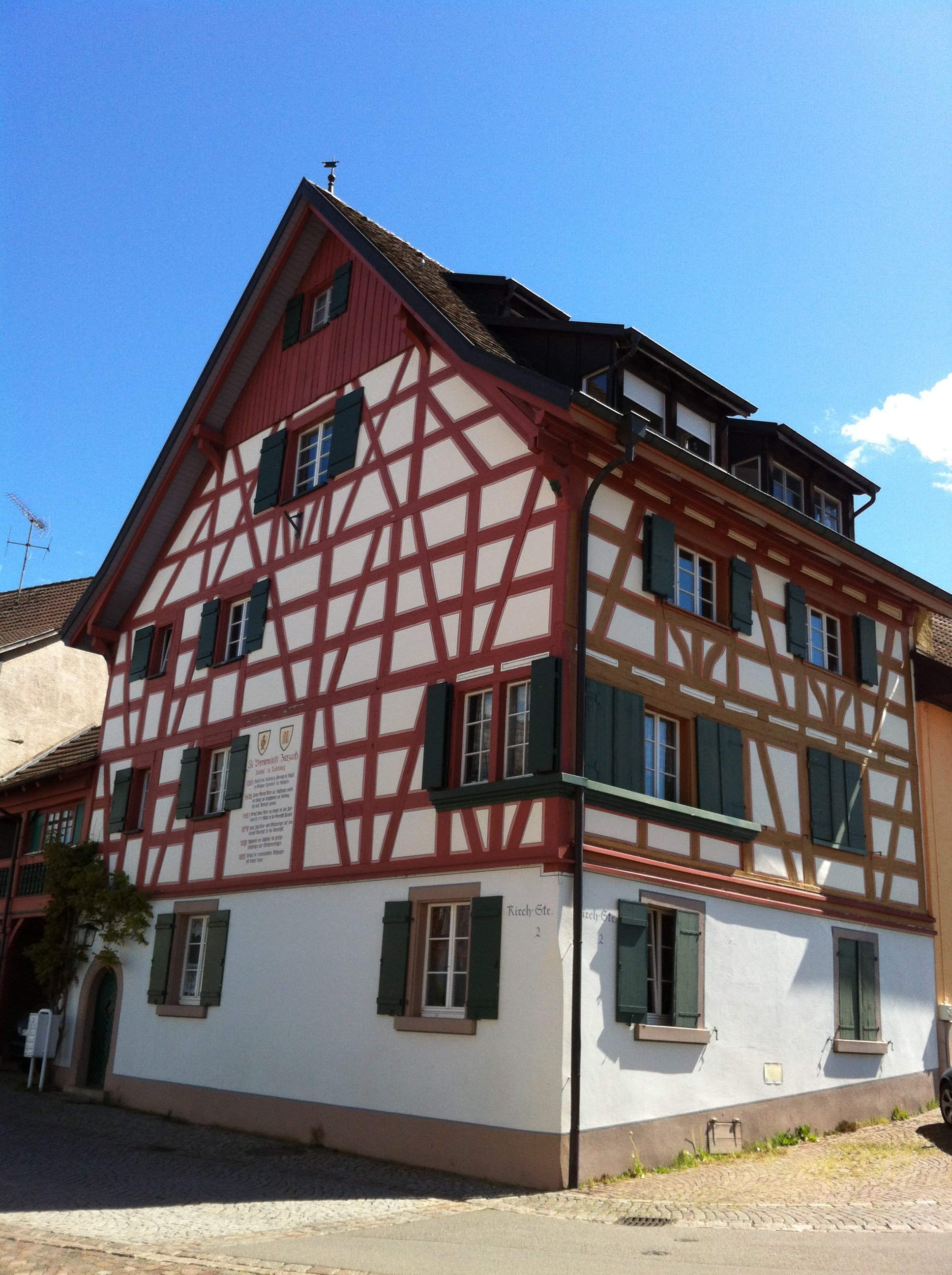 KB Küssaberg, Gemeinde im Landkreis Waldshut in Baden-Württemberg. Ortschaft Kadelburg — Kelnhof.